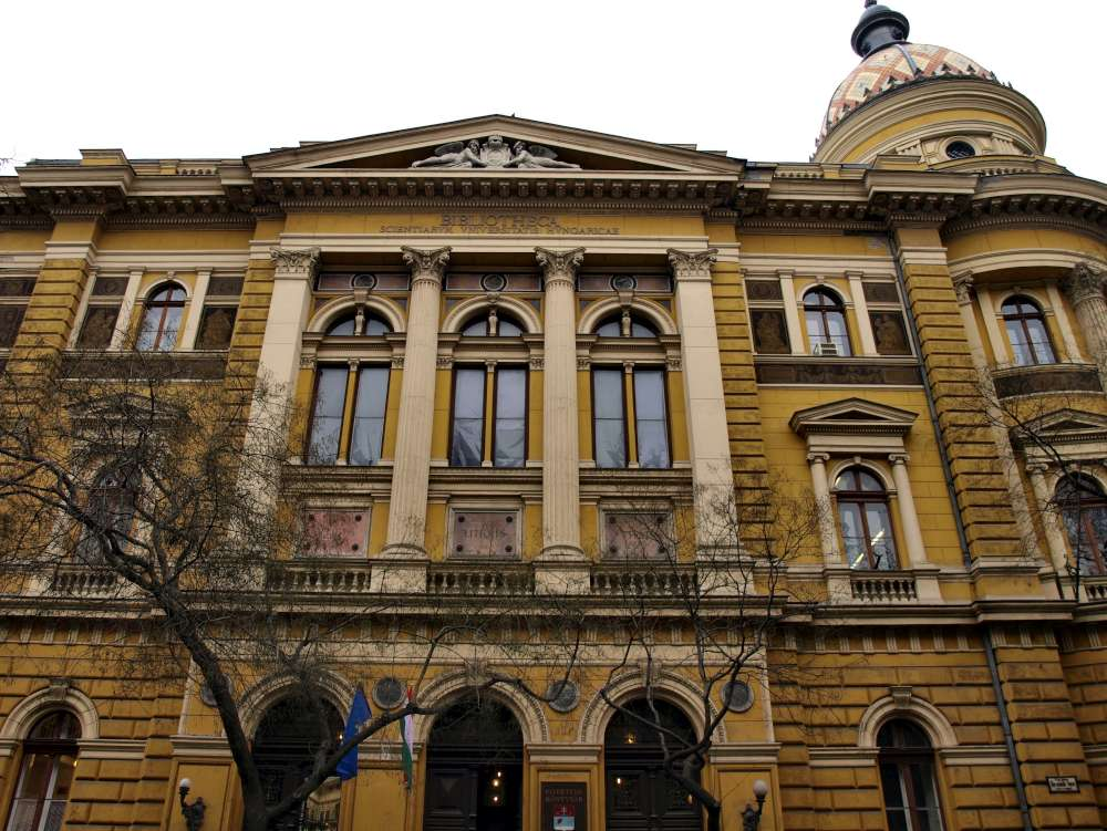 ELTE Egyetemi Könyvtár. - Budapest, V.ker., Ferenciek tere 6.